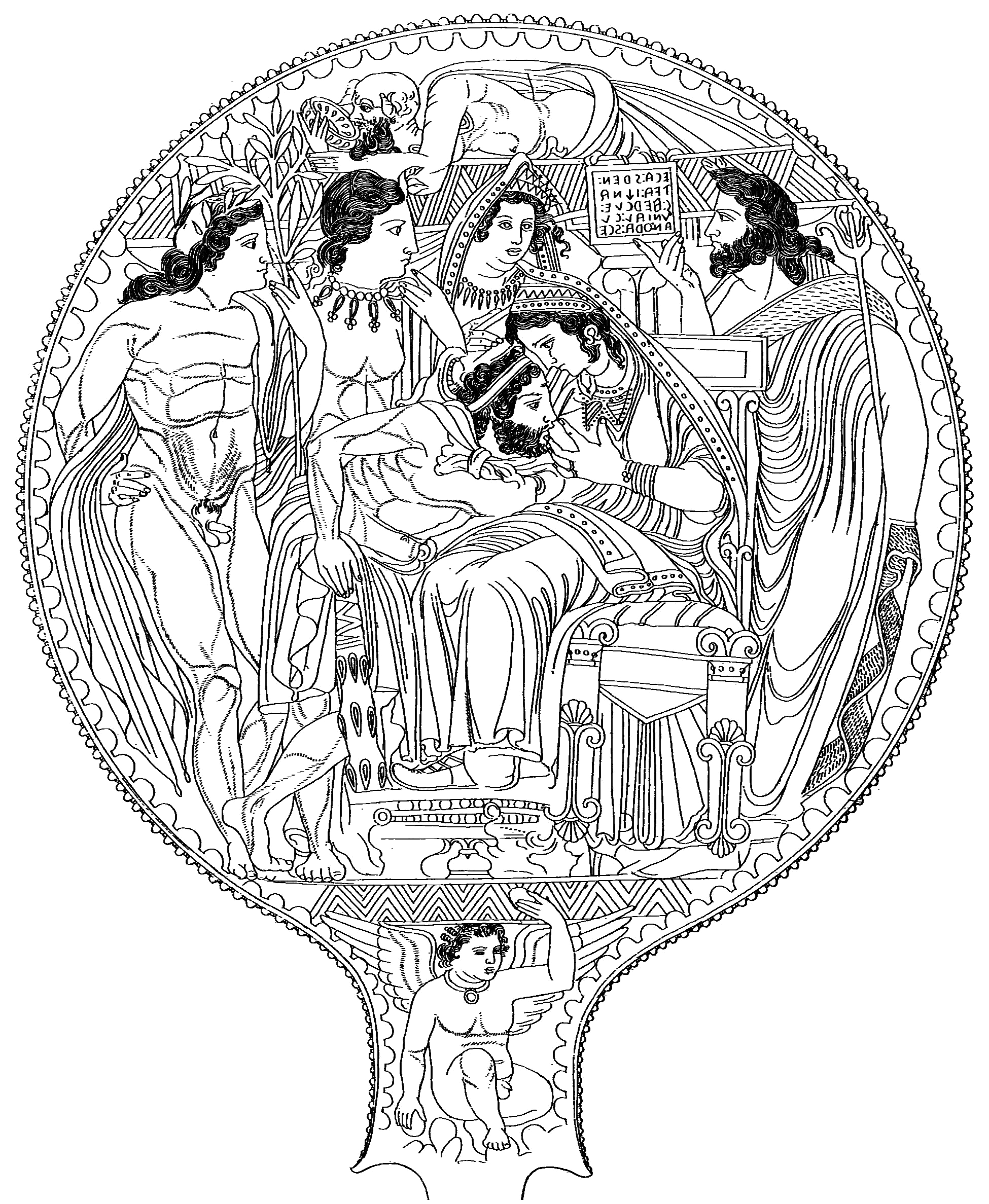 Bronzespiegel von Volterra (Archäologisches Nationalmuseum Florenz)Originalbeschreibung der Quelle: „Uni nursing the adult Hercle in front of divine witnesses. Etruscan mirror from Volterra in Florence, Museo Archeologico Nazionale.“